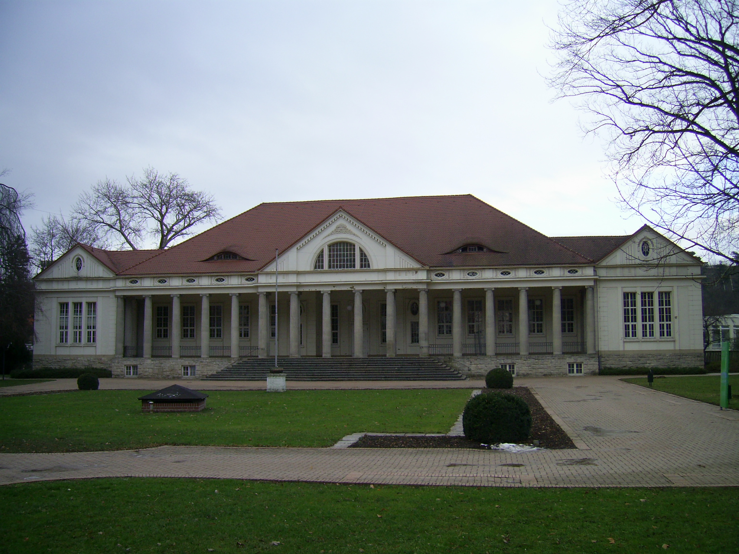 Kurmittelhaus im Stadtpark in Bad Kösen